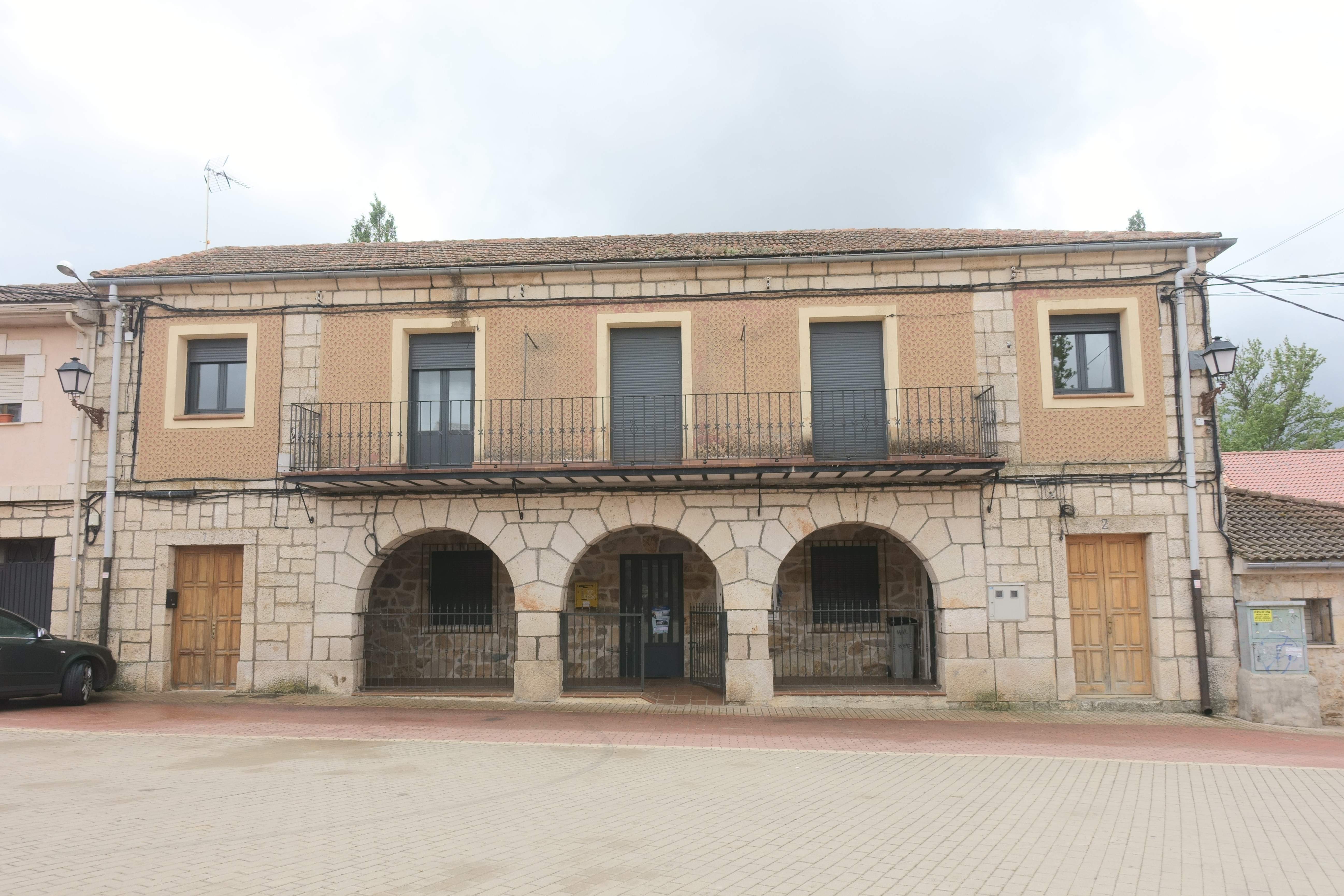 Casa consistorial de Castro de Fuentidueña (Segovia, España).